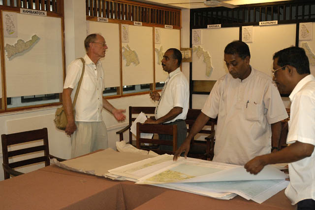 Map room, Sarvodaya HQ